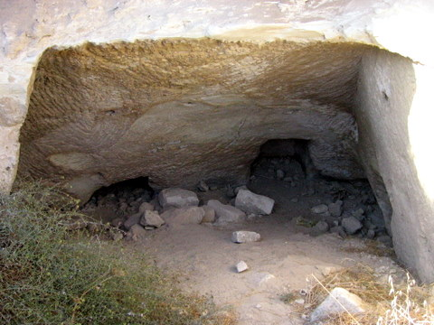 tel guded